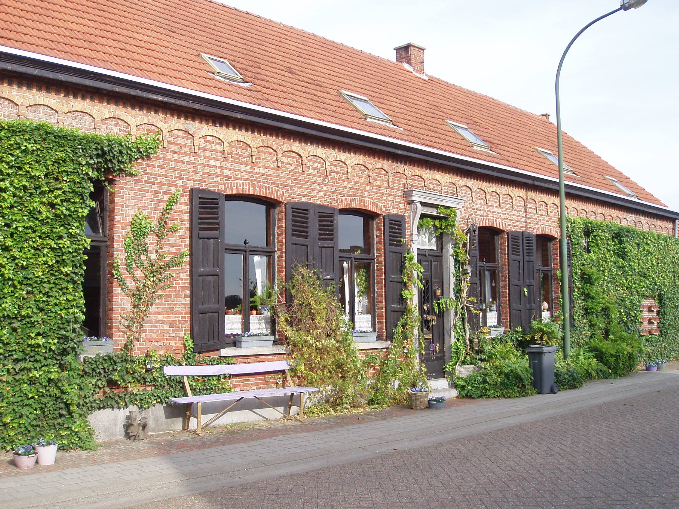 Hoeve en noodgemeentehuis tijdens WO-I (Zondereigen)